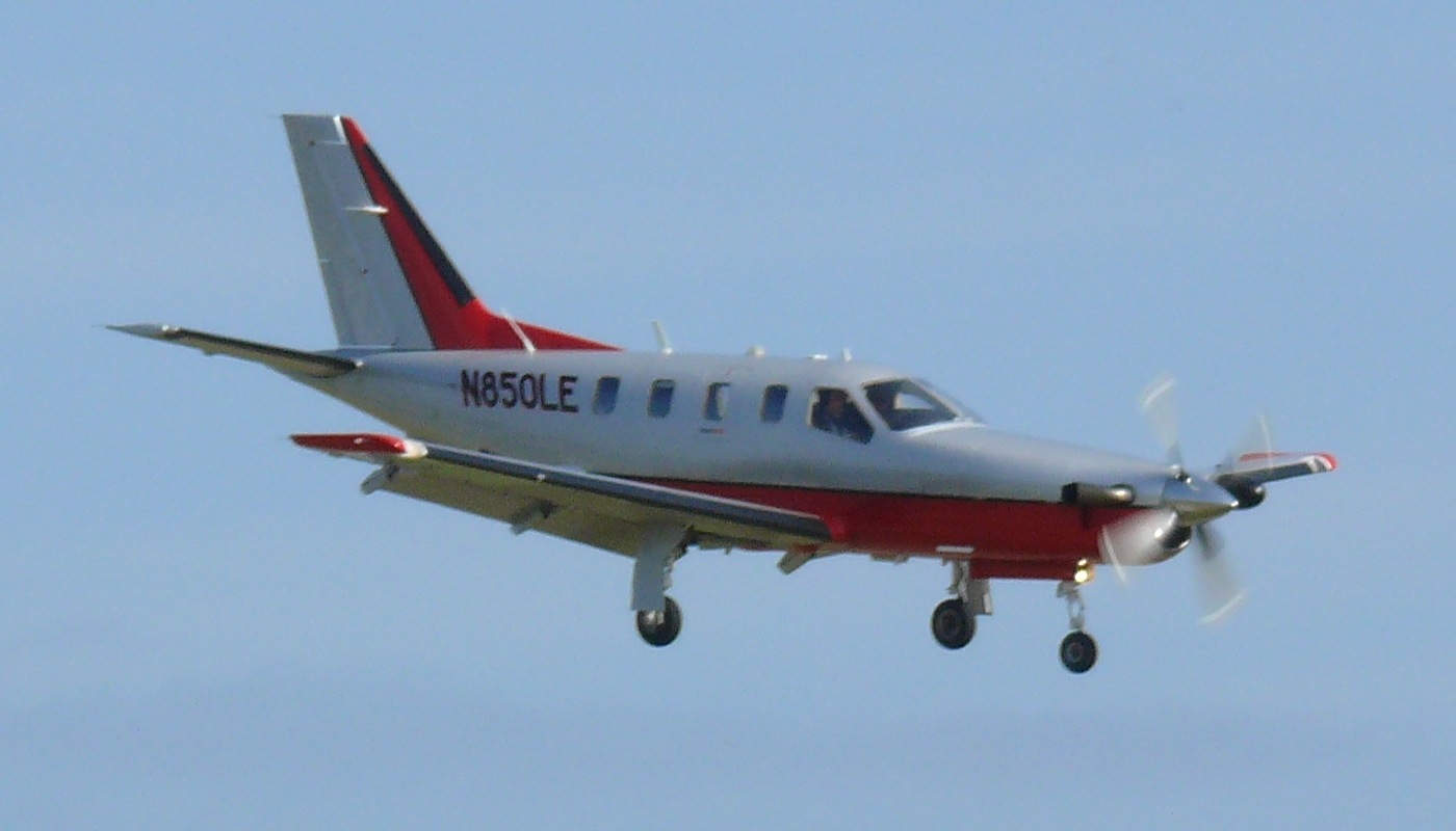 Landing TBM850